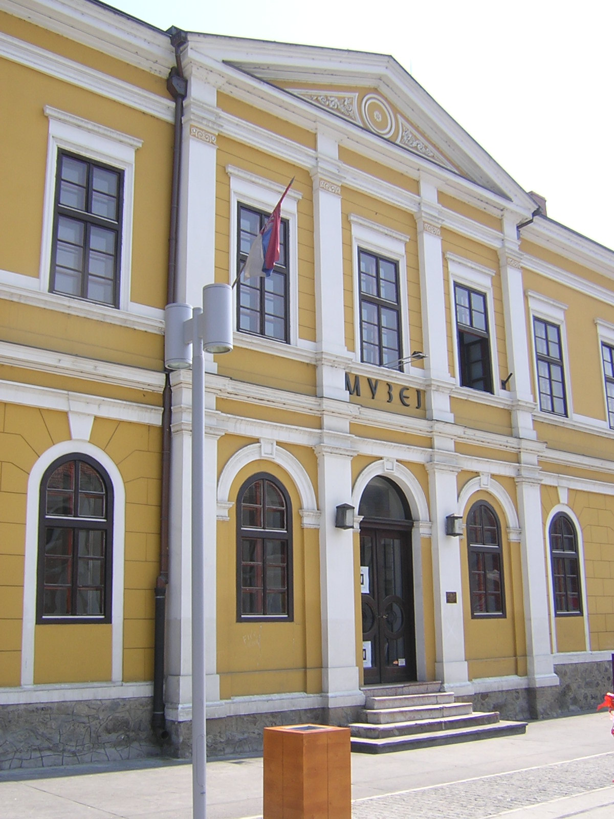 Narodni muzej u Kraljevu